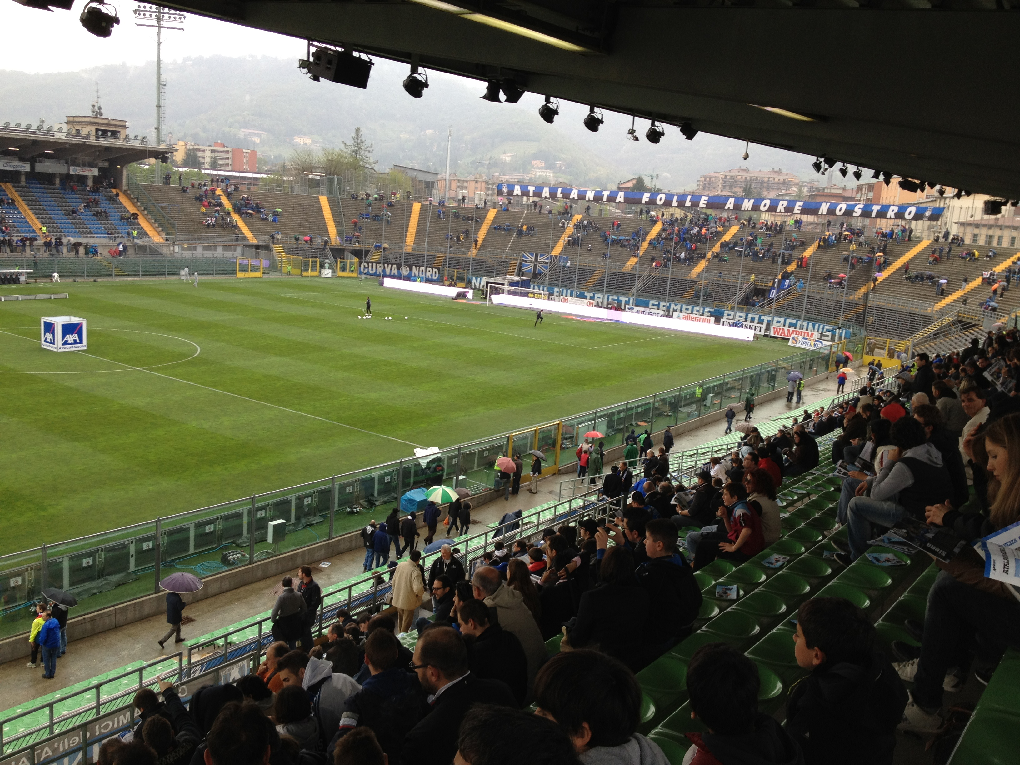 Curva Nord dalla tribuna Giulio Cesare